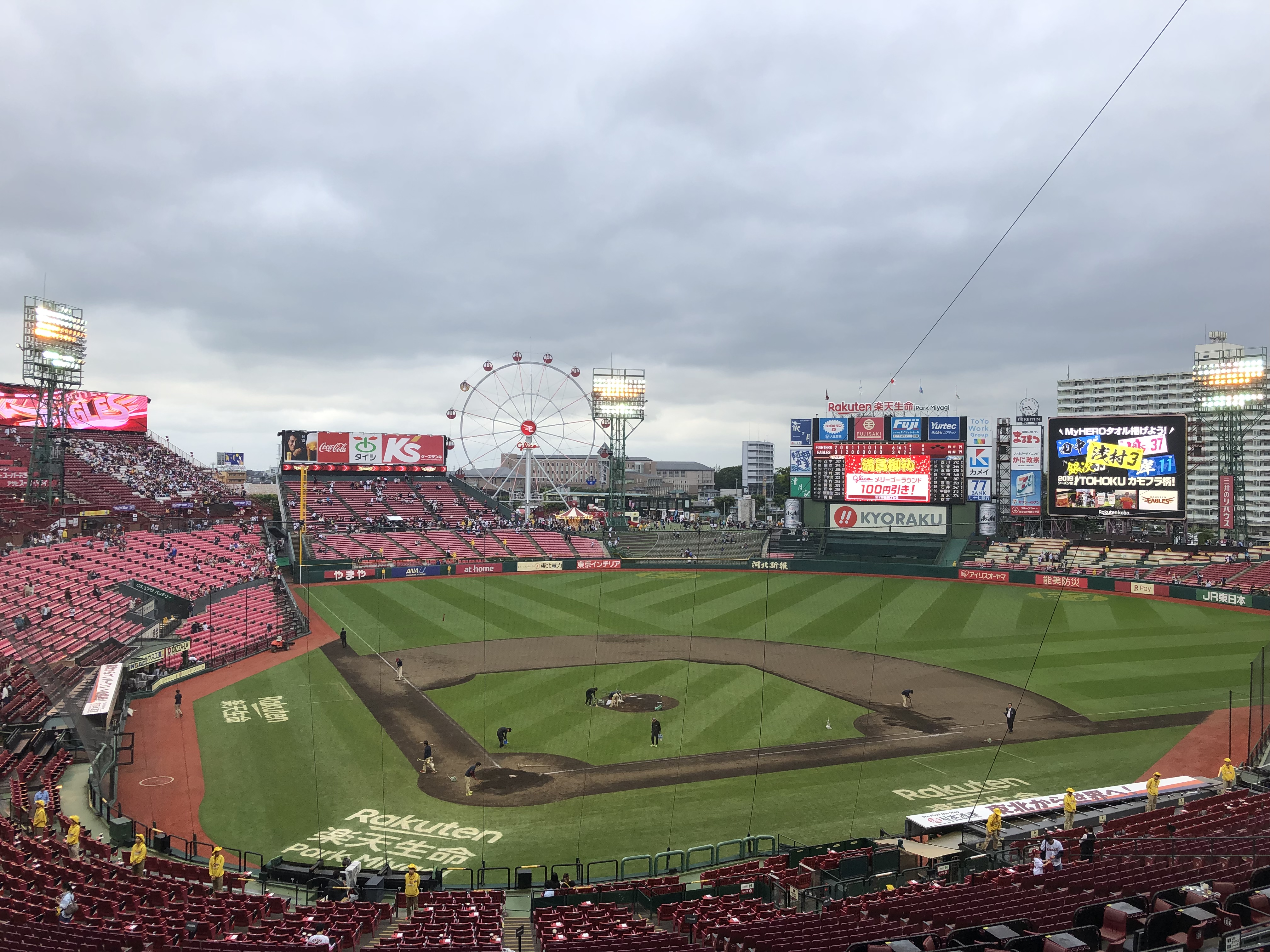 フィールド全景